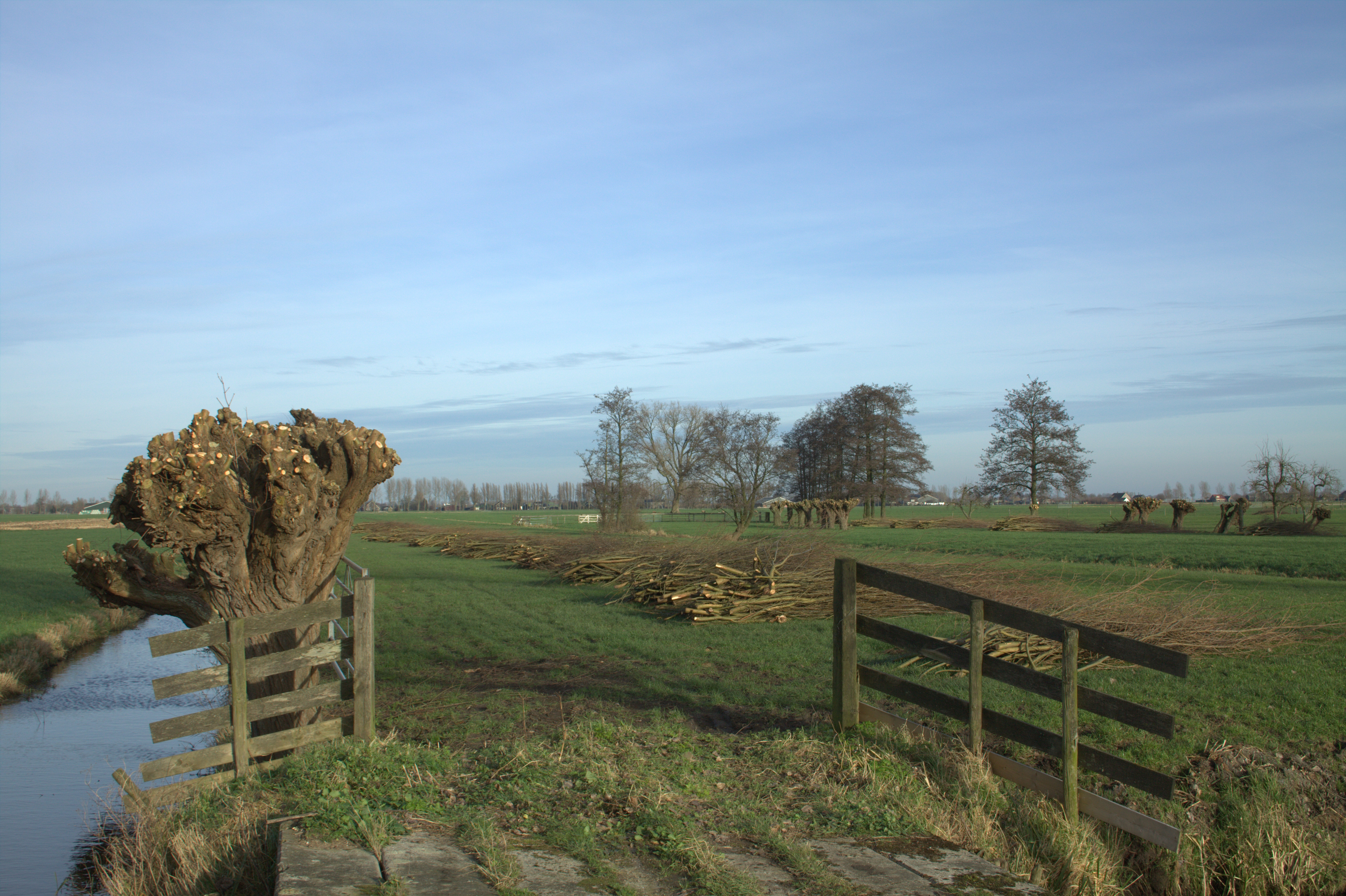 Knotwilgen worden regelmatig afgezet om de boom in goede conditie te houden, hier zien we dat gebeuren in Overheicop tussen Leerdam en Hei-en Boeicop.